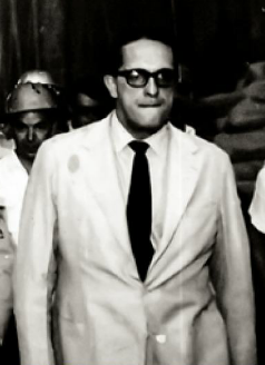 Carlos Lacerda como Governador da Guanabara em visita à obra do Metrô